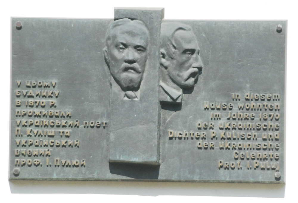 Gedenktafel für P. Kulisch und I. Puluj aus der Ukraine in der Skodagasse in Wien